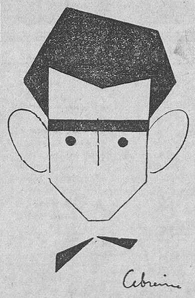 Ricardo Camino por Álvaro Cebreiro, El Pueblo Gallego, 1934